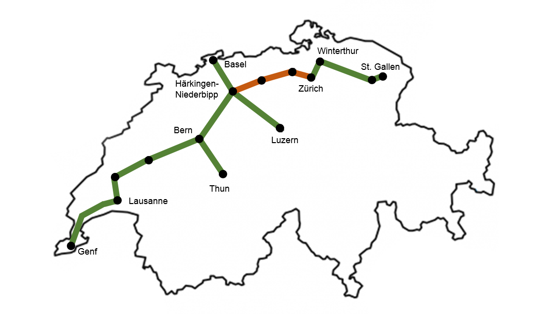 Geplantes Gesamtnetz des CST; erste Ausbaustufe in orange gekennzeichnet